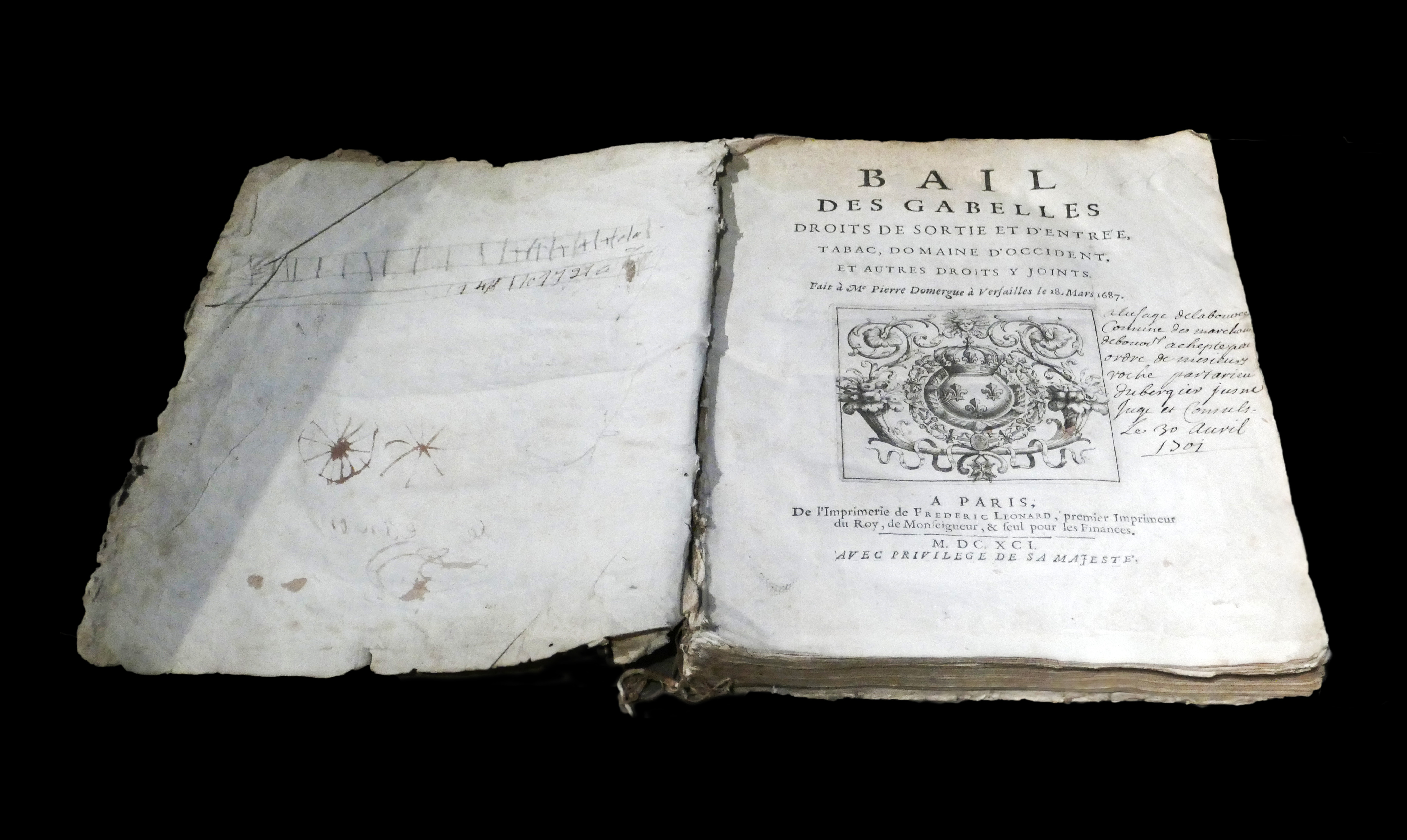 Bail des gabelles, droits de sortie et d'entrée, tabac, domaine d'Occident et autres droits y joints fait à Me Pierre Domergue à Versailles, le 18 mars 1687. Musée des marais salants à Batz-sur-Mer (Loire-Atlantique).